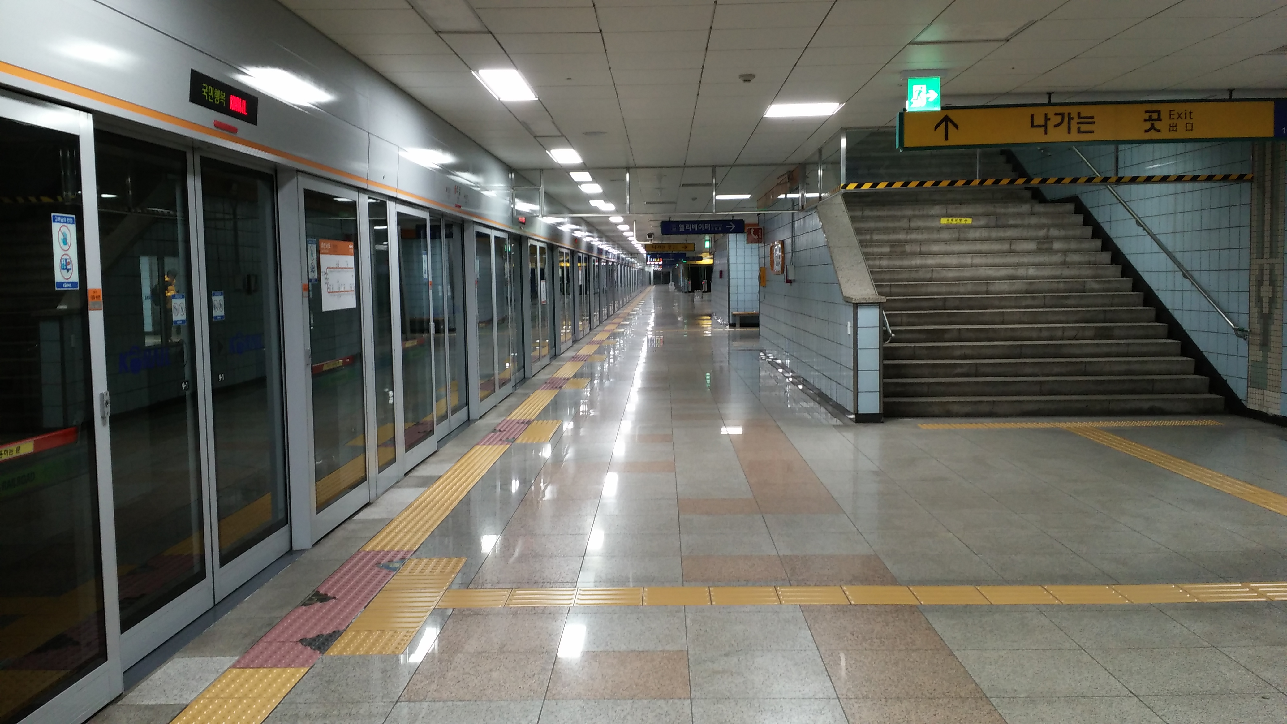 주엽역 승강장